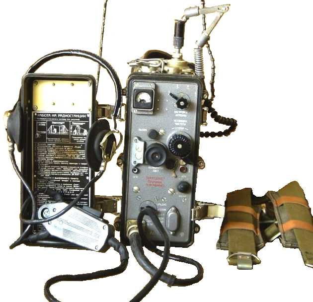 Radiostacja przenośna UKF, małej mocy R-105M. Dzięki zastosowaniu miniaturowych lamp bazcokołowych, gabarytami zasadniczo różniła się od zwykłej radiostacji R-105D. Na zdjęciu widoczny zestaw słuchawkowo-mikrofonowy, szelki do przenoszenia radiostacji na plecach i zwalniana z usztywnienia antena prętowa typu Kulikowa. Zdjęcie pochodzi ze strony